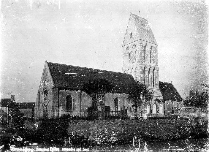 Vue générale de l'église de Formigny par Séraphin-Médéric Mieusement